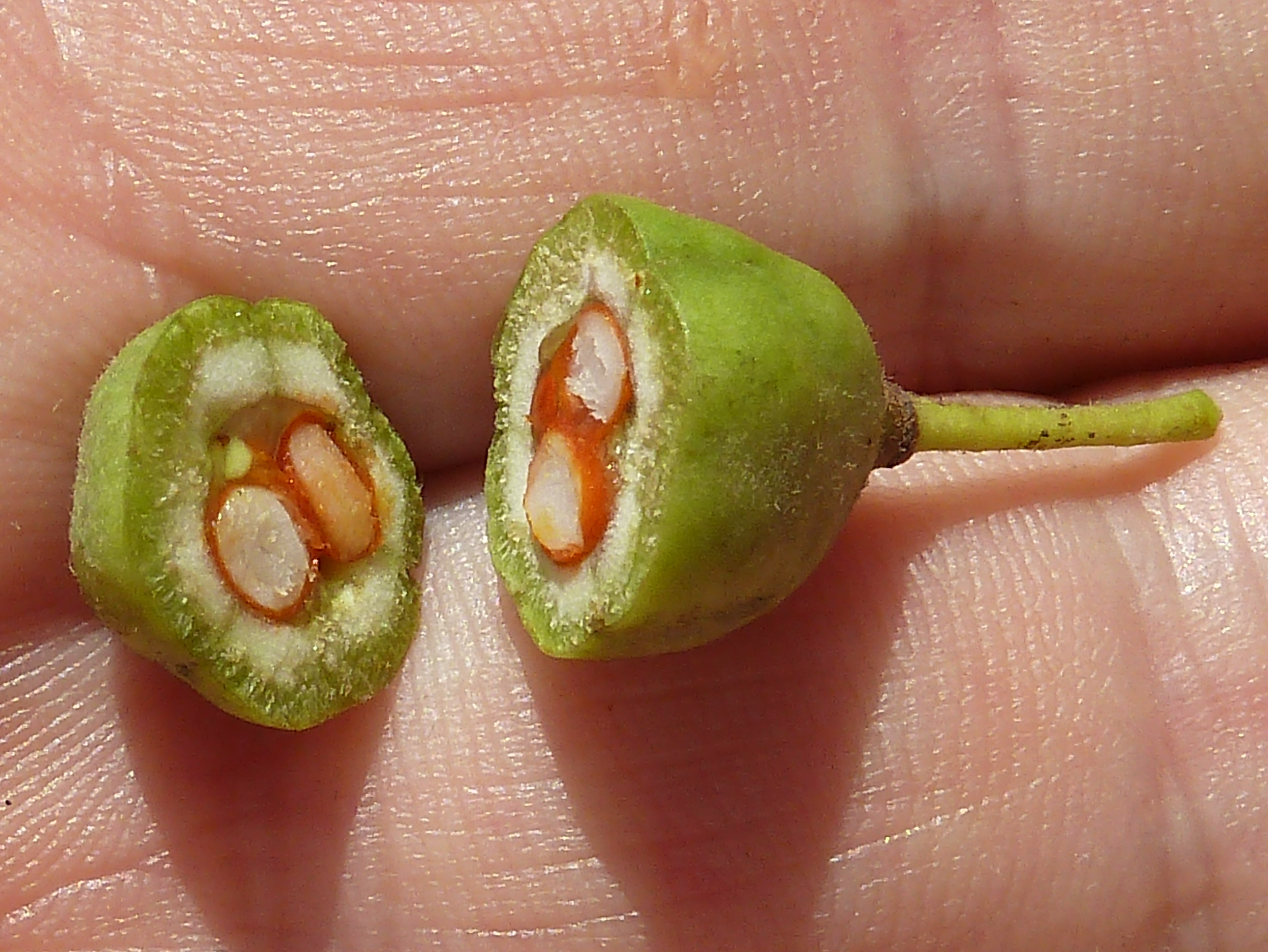 Pittosporum tobira : Fruto inmaduro, corte axial - Parque de la Huerta, Albatera (Alicante, España).